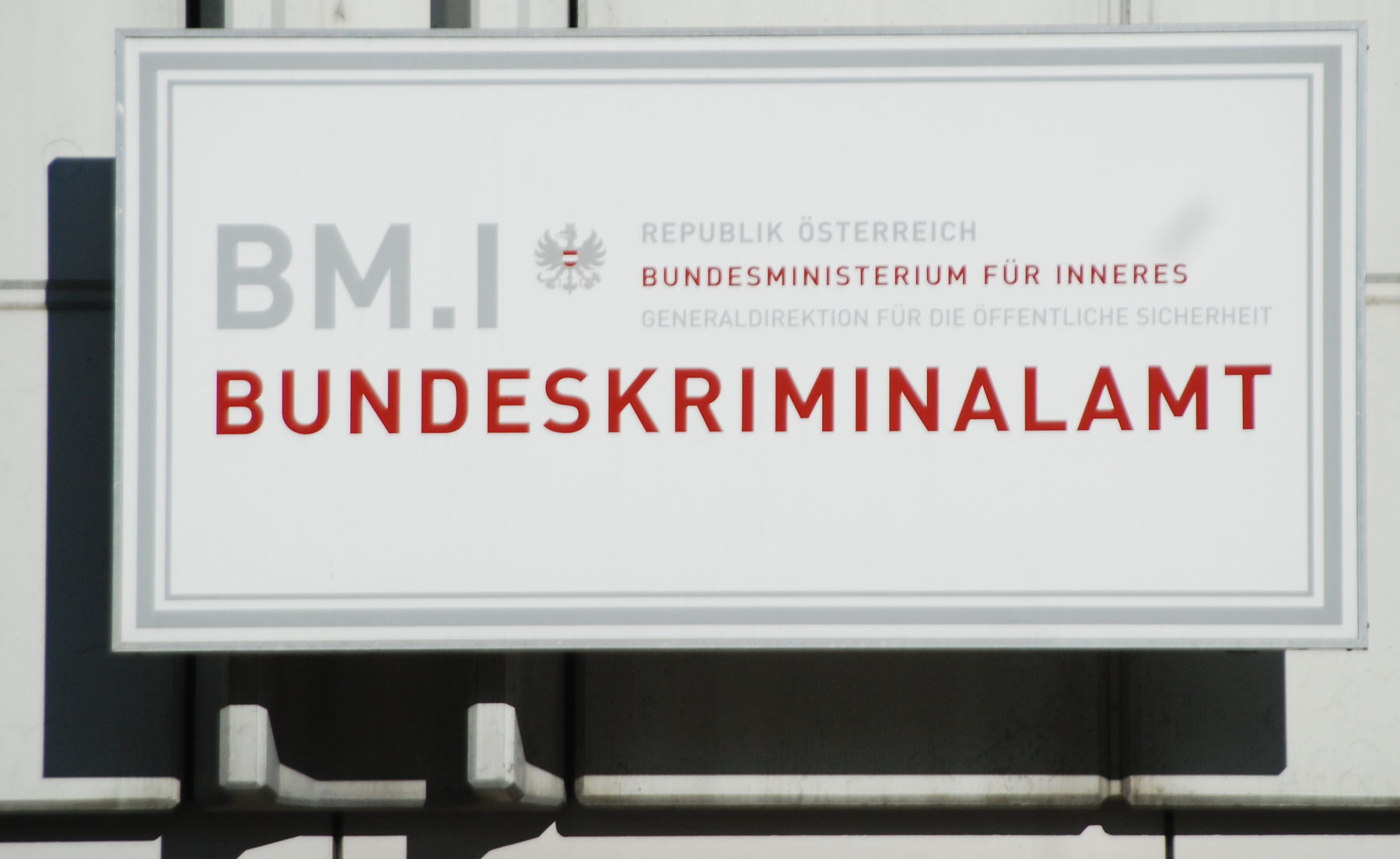 Tafel am Bundesamtsgebäude Josef-Holaubek-Platz in Wien-Alsergrund